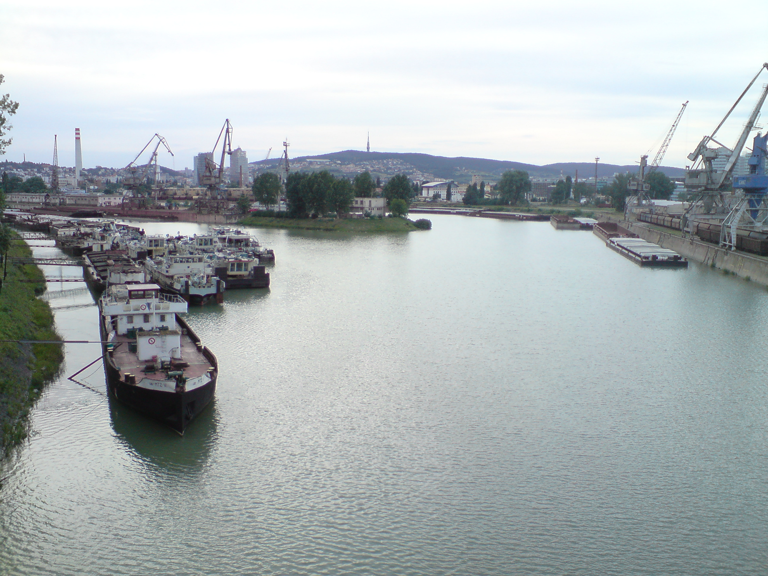 Zimný prístav, Ružinov, Bratislava II